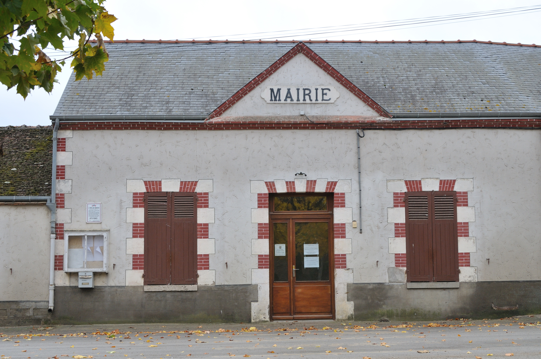 Mairie de Bouilly-en-Gâtinais, Loiret, France